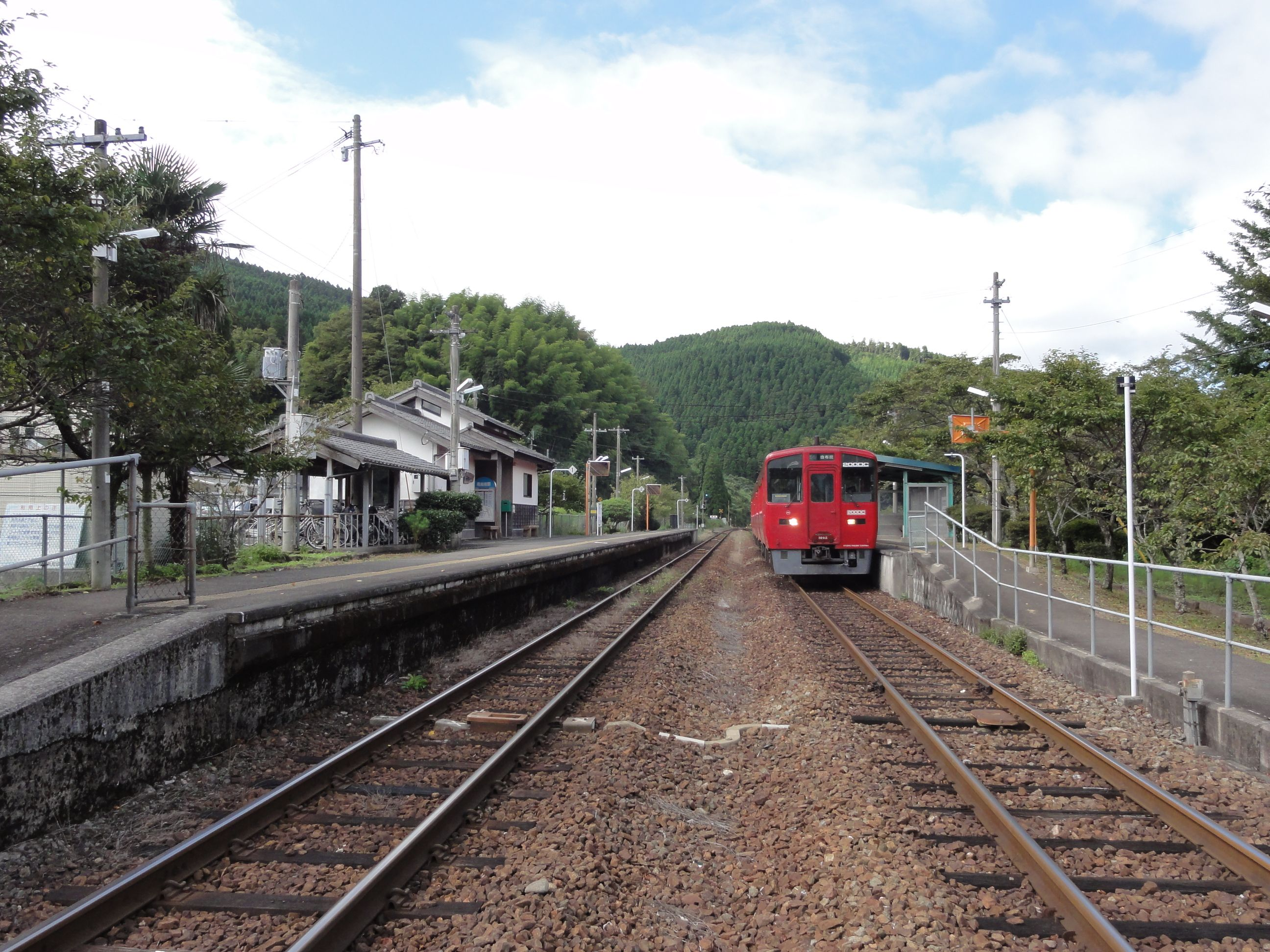 南由布駅ホーム